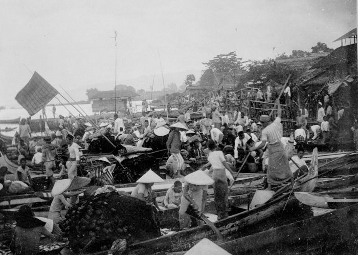 Foto. De binnenkomst van de vissers op Ambon, Molukken.